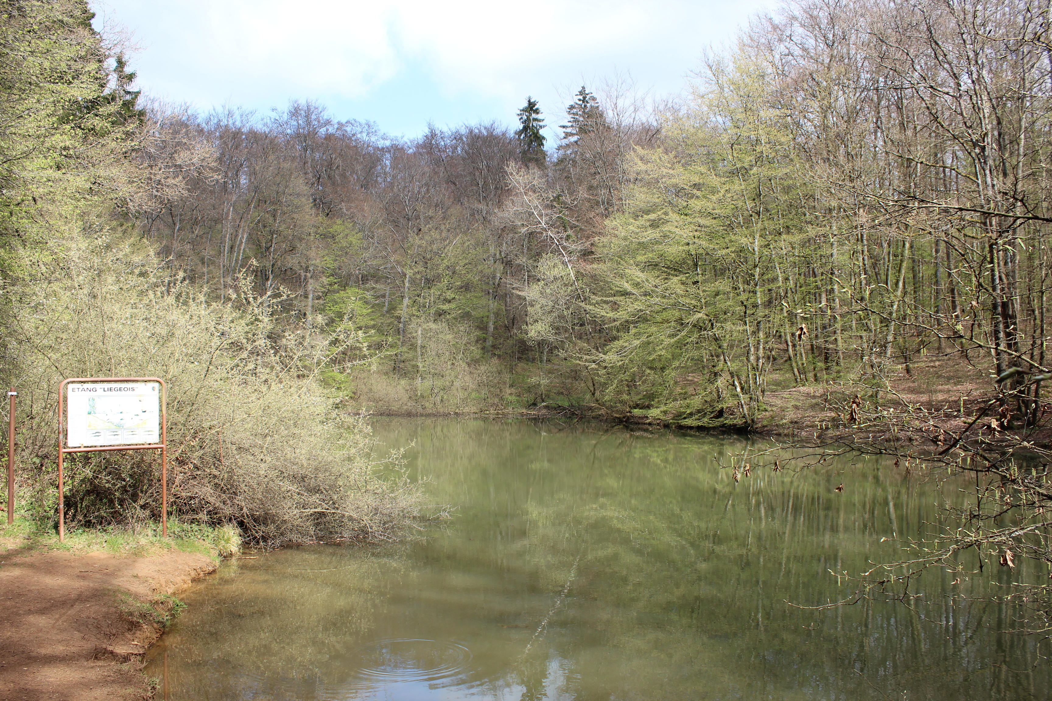 De Liègeois-Weier am Naturschutzgebitt Ellergronn zu Esch-Uelzecht.